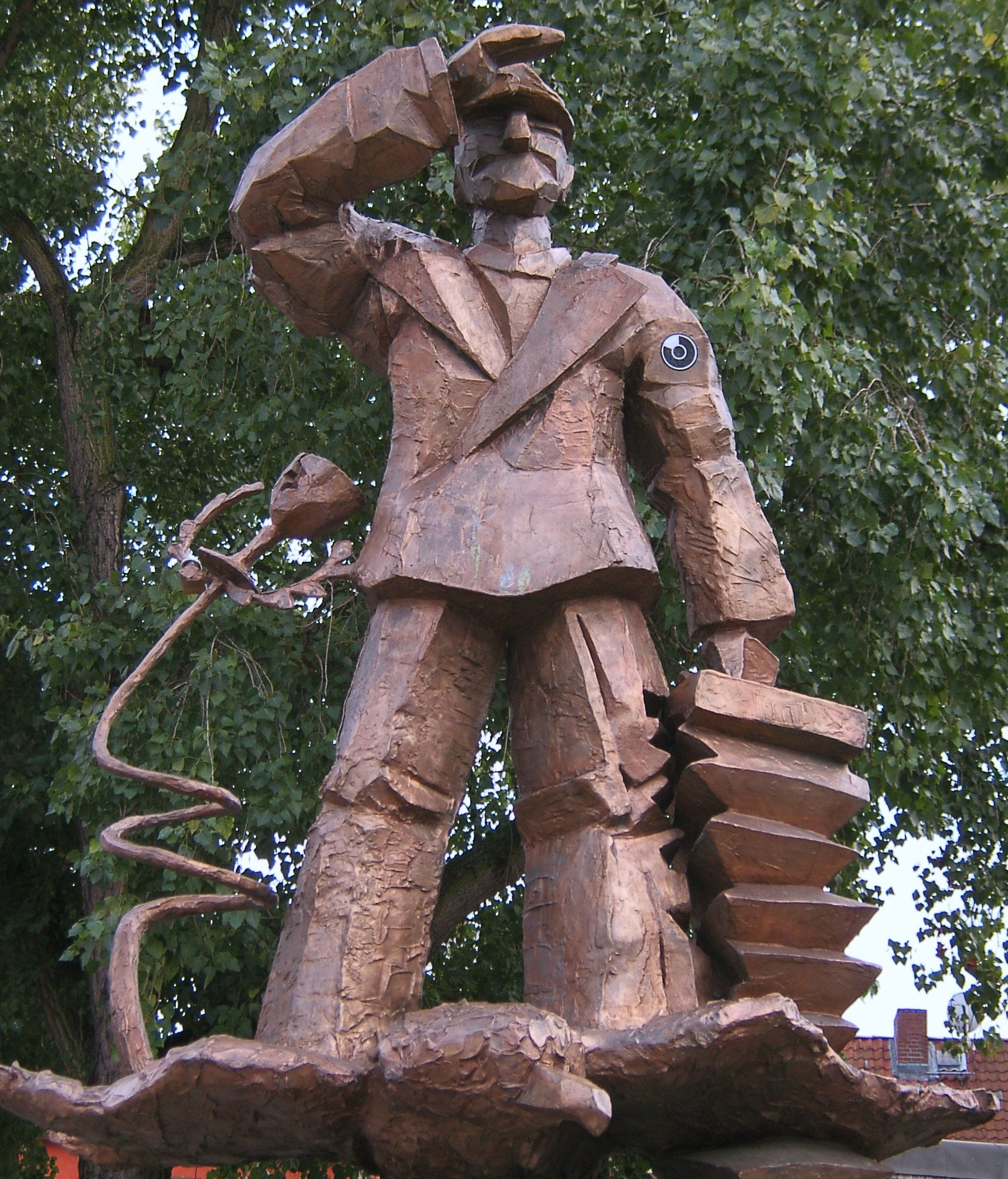 Bildbeschreibung: Hamburg, St.Pauli, Hans Albers-Statue Fotograf eigene Aufnahme Datum: 2004